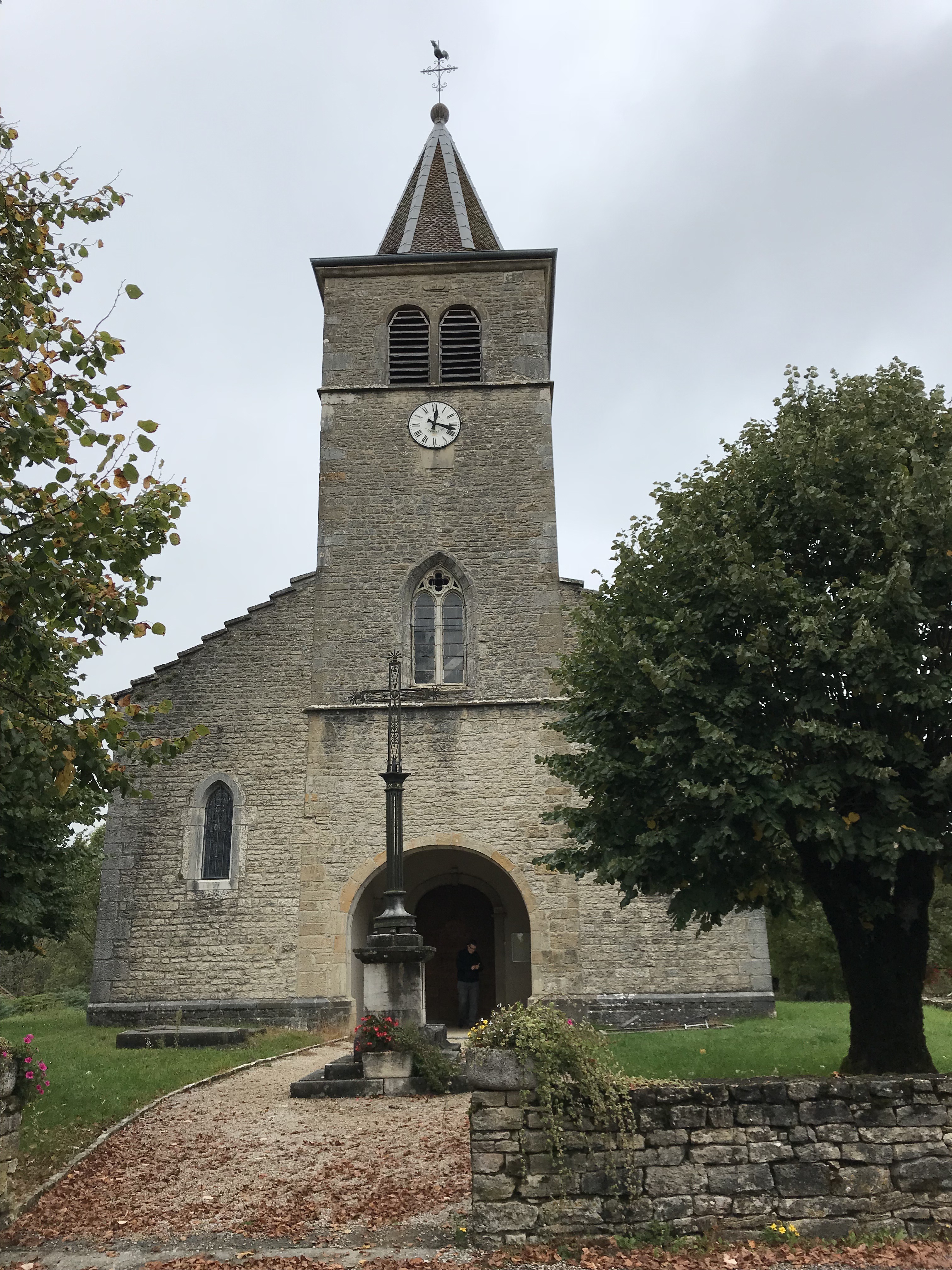 Marigna-sur-Valouse (Jura, France) en octobre 2017.